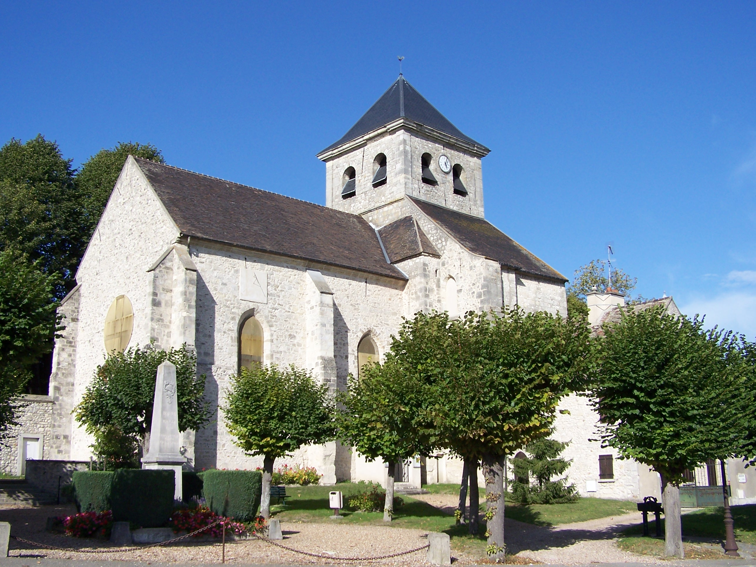 Église Saint-Pierre-et-Saint-Nicolas de Neauphle-le-Vieux (Yvelines, France)